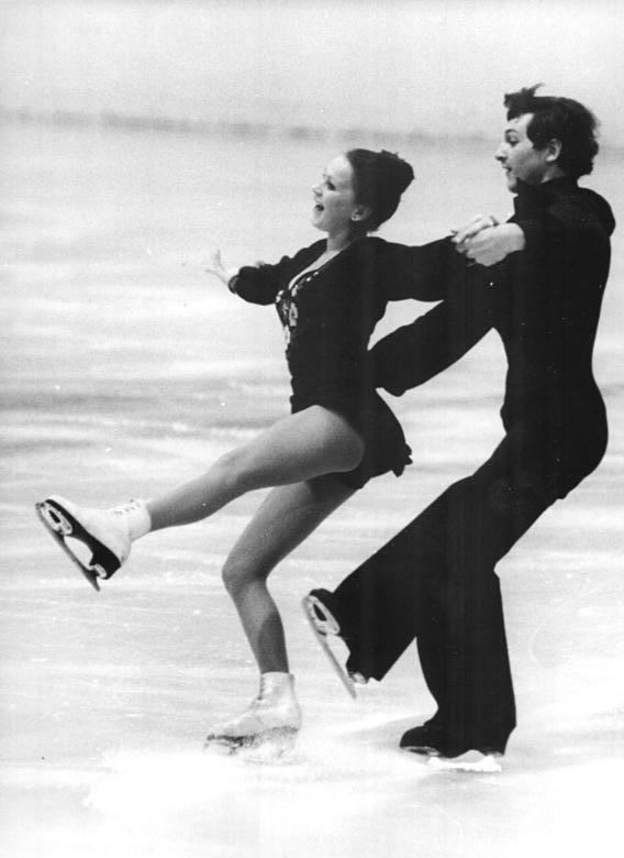 Marina Sueva, Andre Witmann ADN-ZB Mittelstädt 4.10.75 Berlin: Eiskunstläufer überreichten Geburtstagspräsent. Es ist schon eine Tradition der besten Eiskunstläufer der DDR mit einem Schaulaufprogramm zum Geburtstag der Republik aufzutreten. Gemeinsam mit Gästen aus der UdSSR, der CSSR, aus Österreich und Großbritannien sorgten sie für ein abwechslungsreiches Programm mit neuen Kürausschnitten und Tänzen. Mit ihrem temperamentvollen Tanz begeisterte das sowjetische Meisterklasse-Paar Marina Sueva - Andre Witmann die 3000 Besucher in der Eissporthalle.